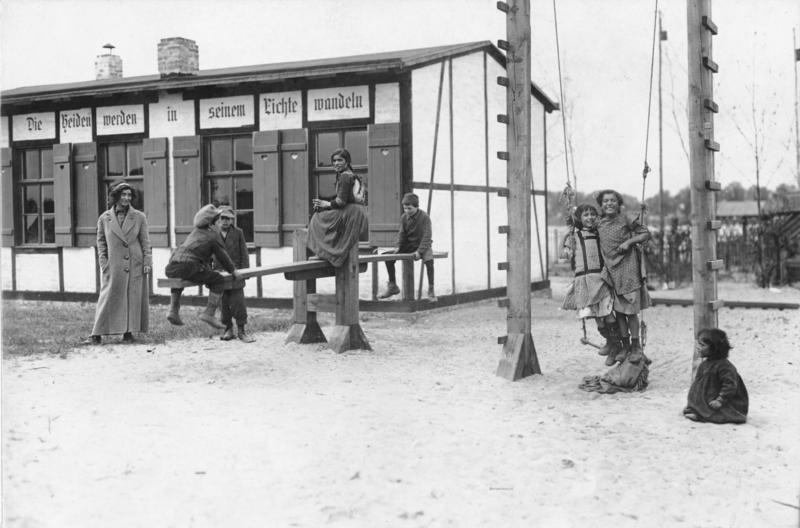 Berlin, Schule für Sinti und Roma Eine Zigeunerschule im Norden Berlins. Vor dem Schulgebäude. Eine Schule für Zigeunerkinder gibt es im aüßersten Norden Berlins. Die Berliner Stadtmission hat ein bescheidenes Schulhaus eingerichtet, in dem die Kinder der in dieser Gegend wohnenden Zigeuner geregelten Unterricht erhalten. In der Nähe der Schule erhält jedes Kind ein Stückchen Land angewiesen, das es bebauen soll. Auf diese Weise möchte man sie zur Seßhaftigkeit erziehen. 1913